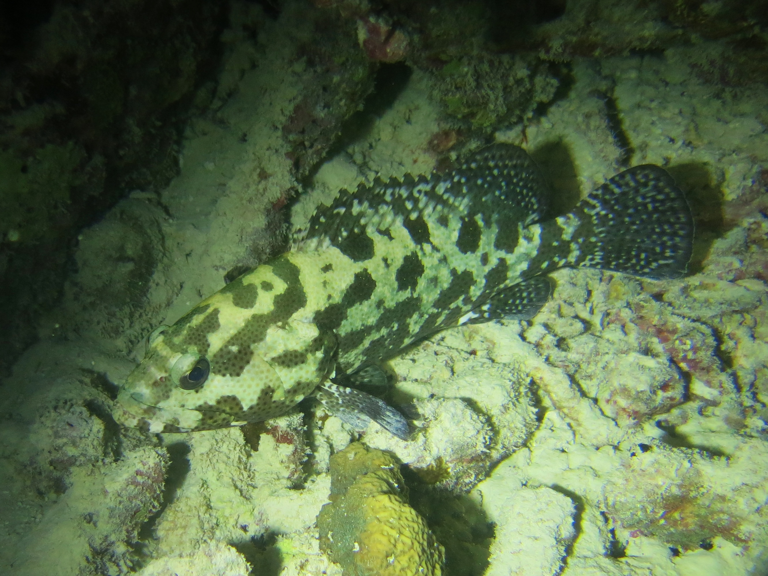 Un mérou marron (Epinephelus fuscoguttatus) de nuit aux Maldives (Landaagiraavaru, atoll de Baa).